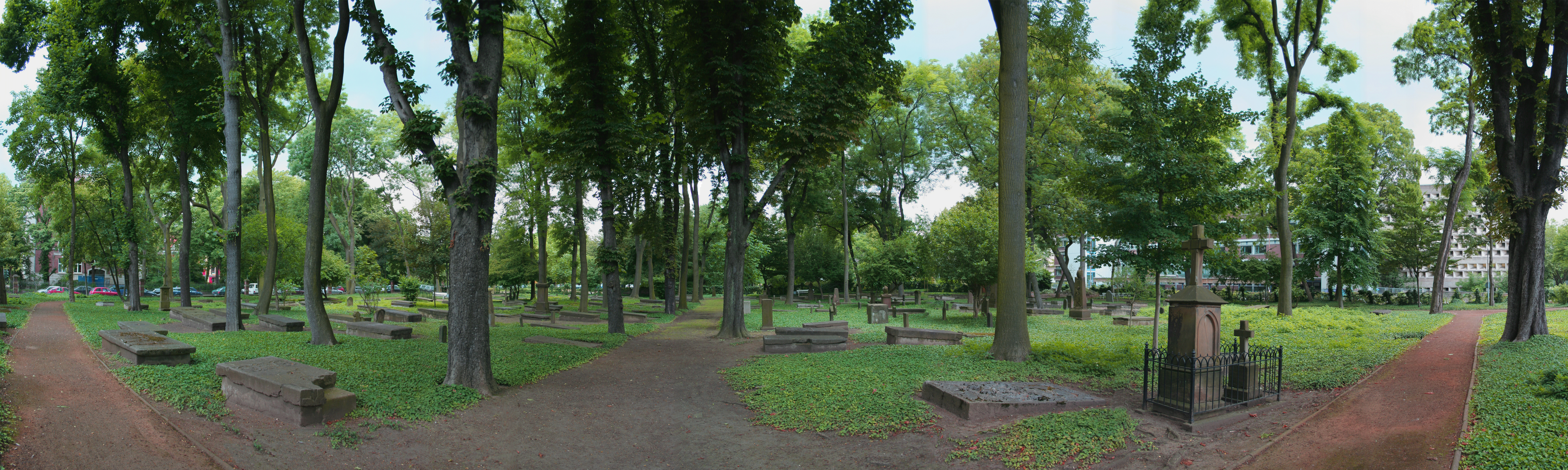 Panoramaaufnahme des alten Kölner Geusenfriedhofs